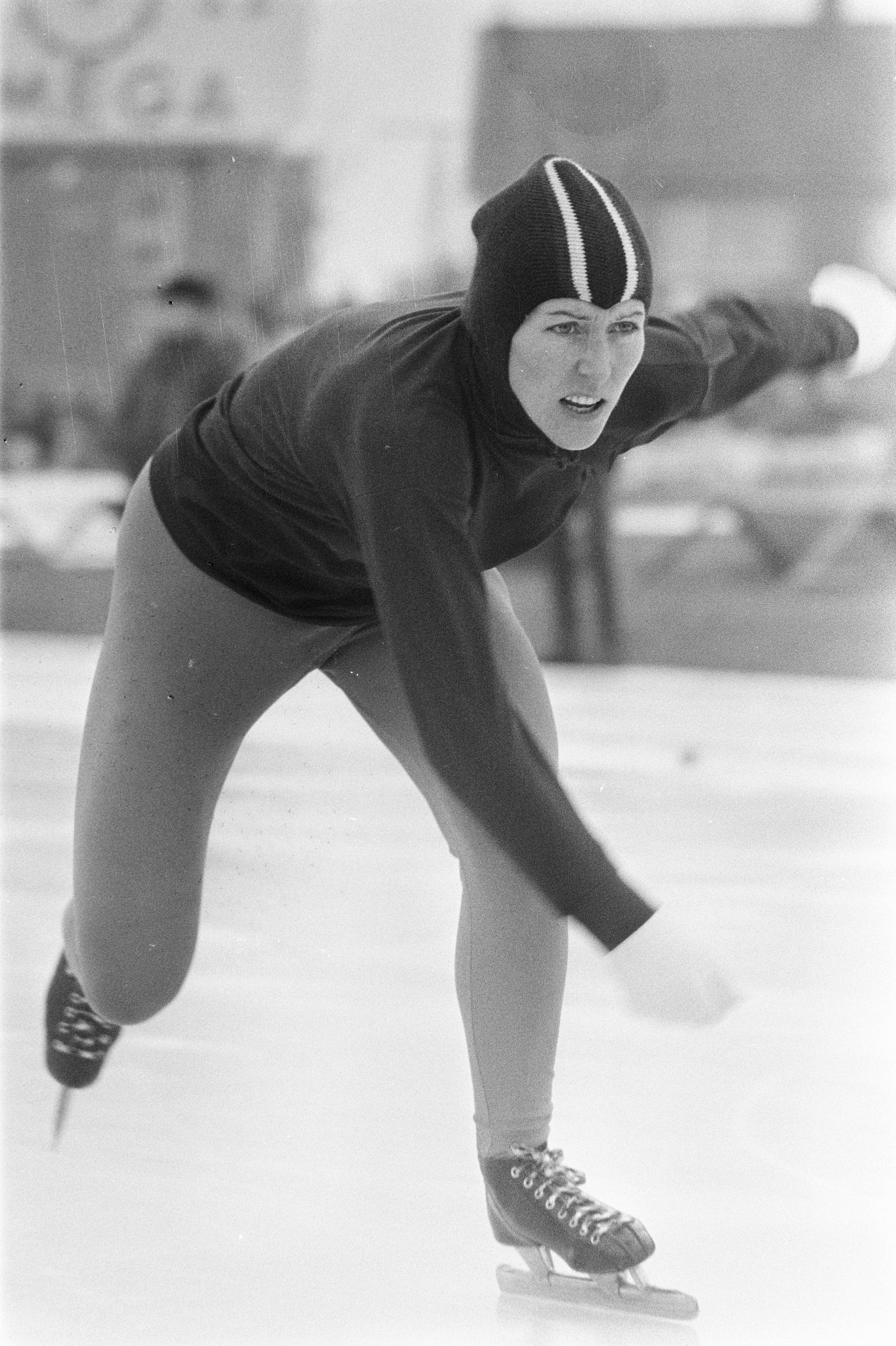 Collectie / Archief : Fotocollectie Anefo Reportage / Serie : [ onbekend ] Beschrijving : Nederlandse schaatskampioenschappen Deventer dames en her Atje Keulen Deelstra in actie 1500 meter Datum : 8 januari 1972 Locatie : Deventer Trefwoorden : schaatsen, sport Persoonsnaam : Atje Keulen Deelstra Fotograaf : Verhoeff, Bert / Anefo Auteursrechthebbende : Nationaal Archief Materiaalsoort : Negatief (zwart/wit) Nummer archiefinventaris : bekijk toegang 2.24.01.05 Bestanddeelnummer : 925-2918